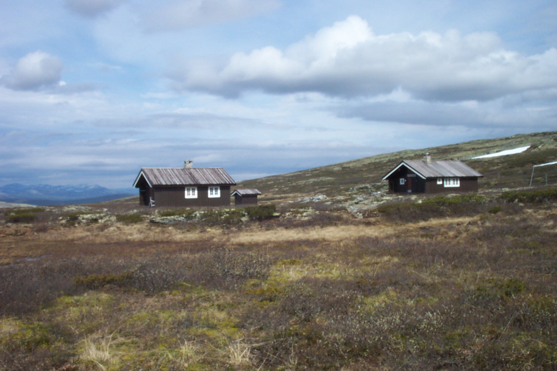 Jammerdalsbu er en ubetjent turisthytte på Ringebufjellet 1130 moh